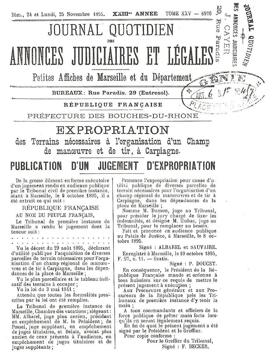 Publication officielle en fin novembre 1895 de l'acte d'expropriation du domaine de Carpiagne, suite au jugement rendu le 8 octobre 1895 par le tribunal de première instance de Marseille et exécuté par le préfet des Bouches-du-Rhône.